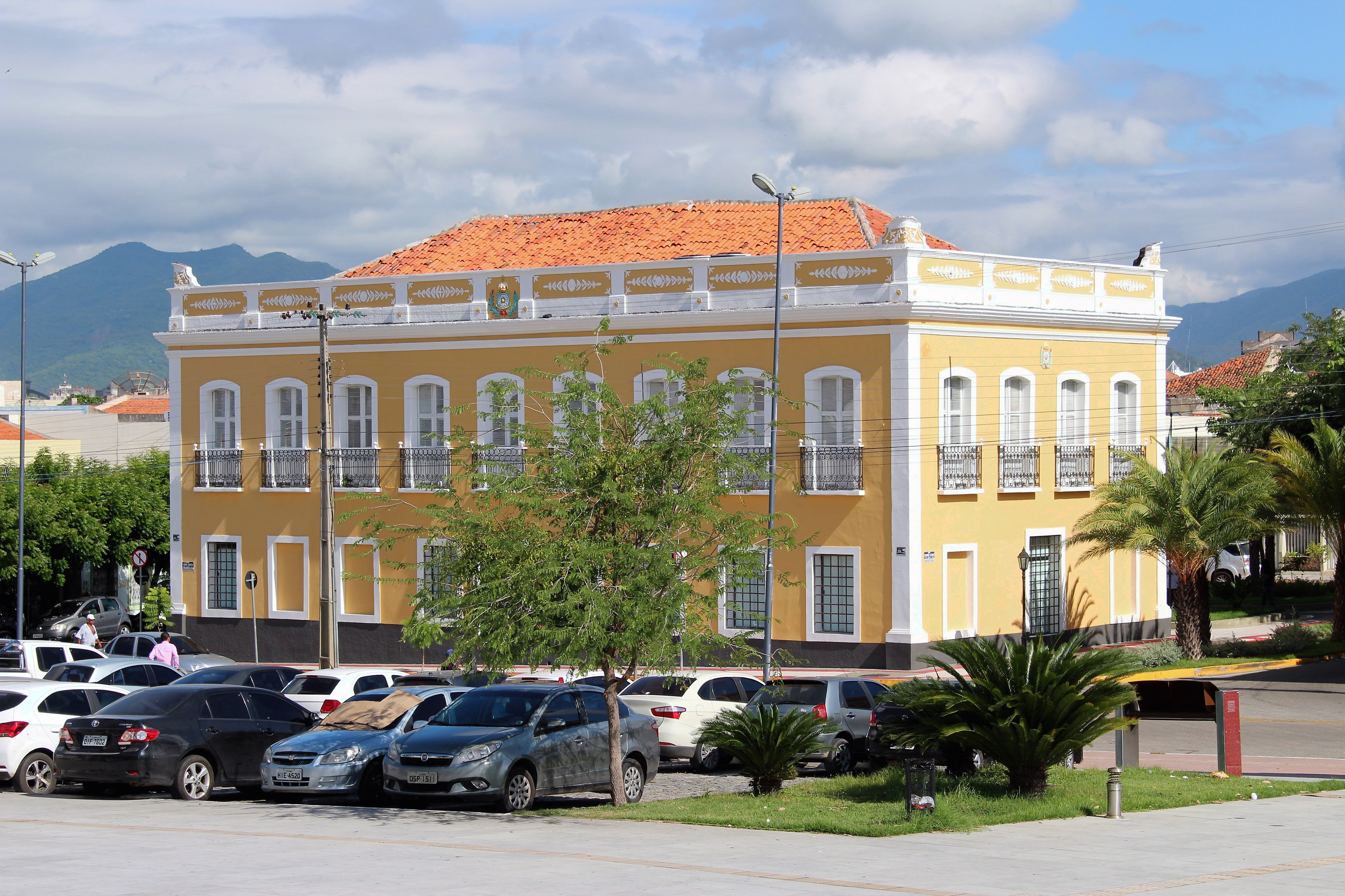 Palácio imperial de Sobral